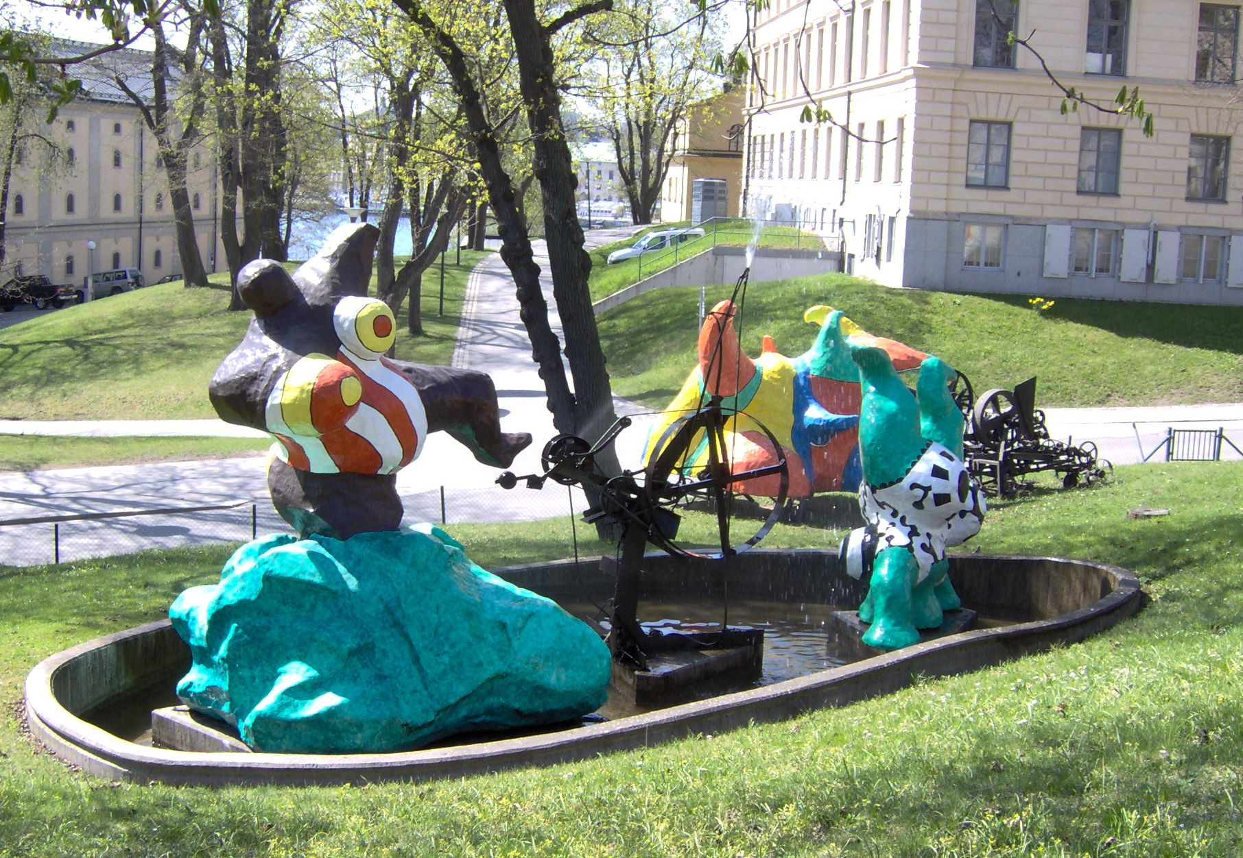 Mobilt konstverk utanför Moderna museet på Skeppsholmen, Stockholm, Sweden.